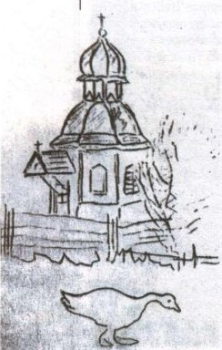 А. Блок. Часовня в Колбах. Скан из Федорук "Старинные усадьбы Берестейщины" (2004)